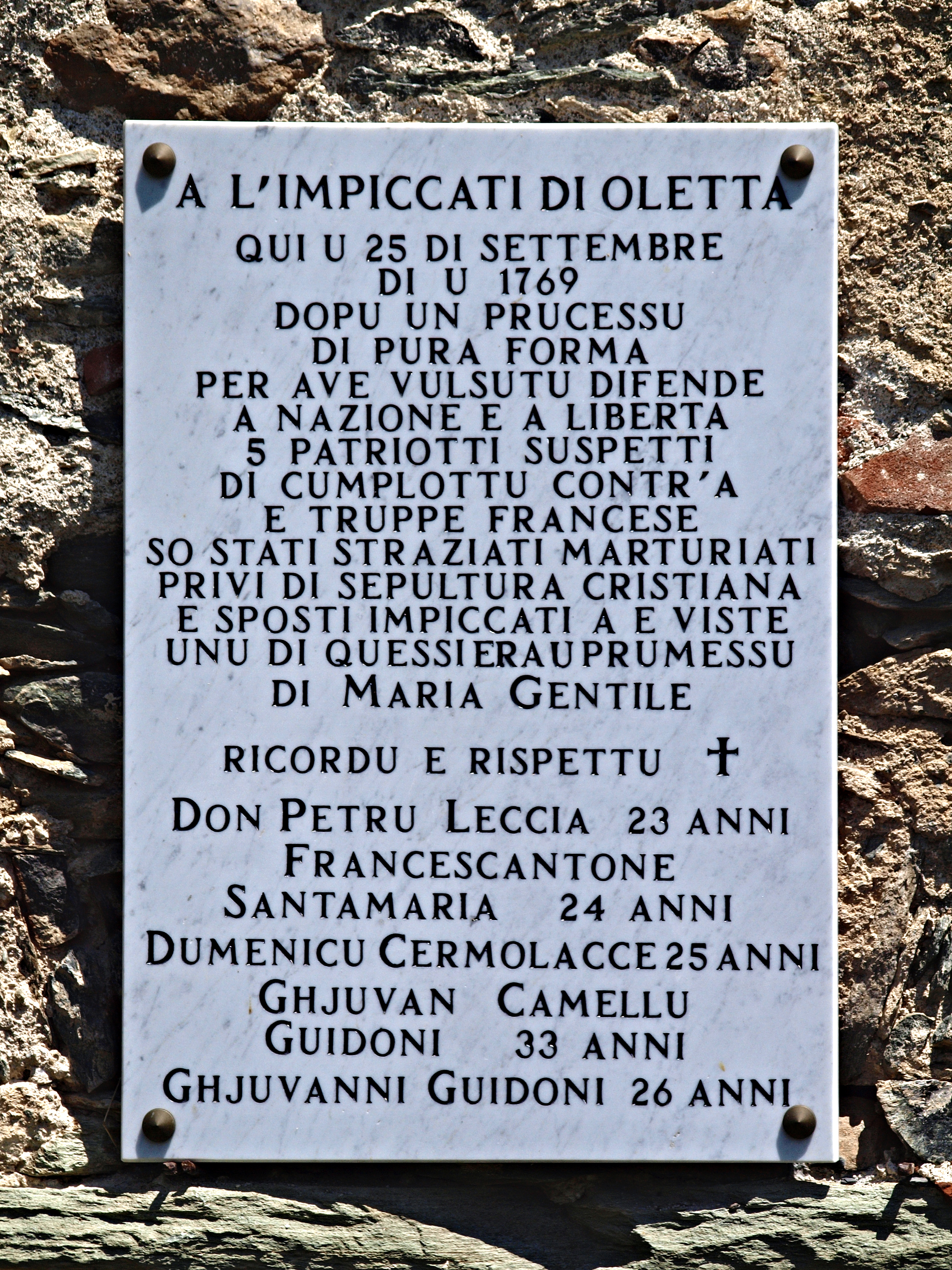 Oletta (Corse) - Plaque commémorative sur mur de l'ancien couvent Saint-François